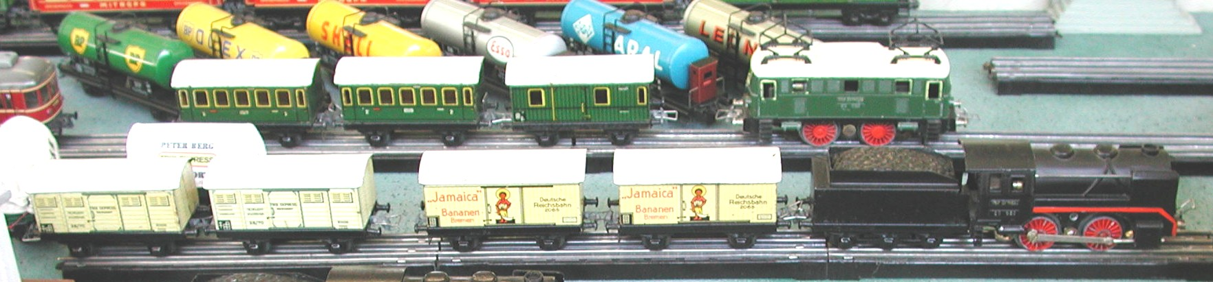 2 Trix Express Züge aus der Wechselstromepoche (Vorkrieg) auf Bakelitgleisen